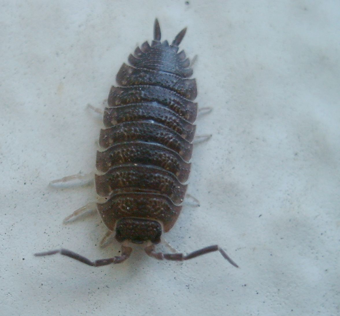 Kellerassel